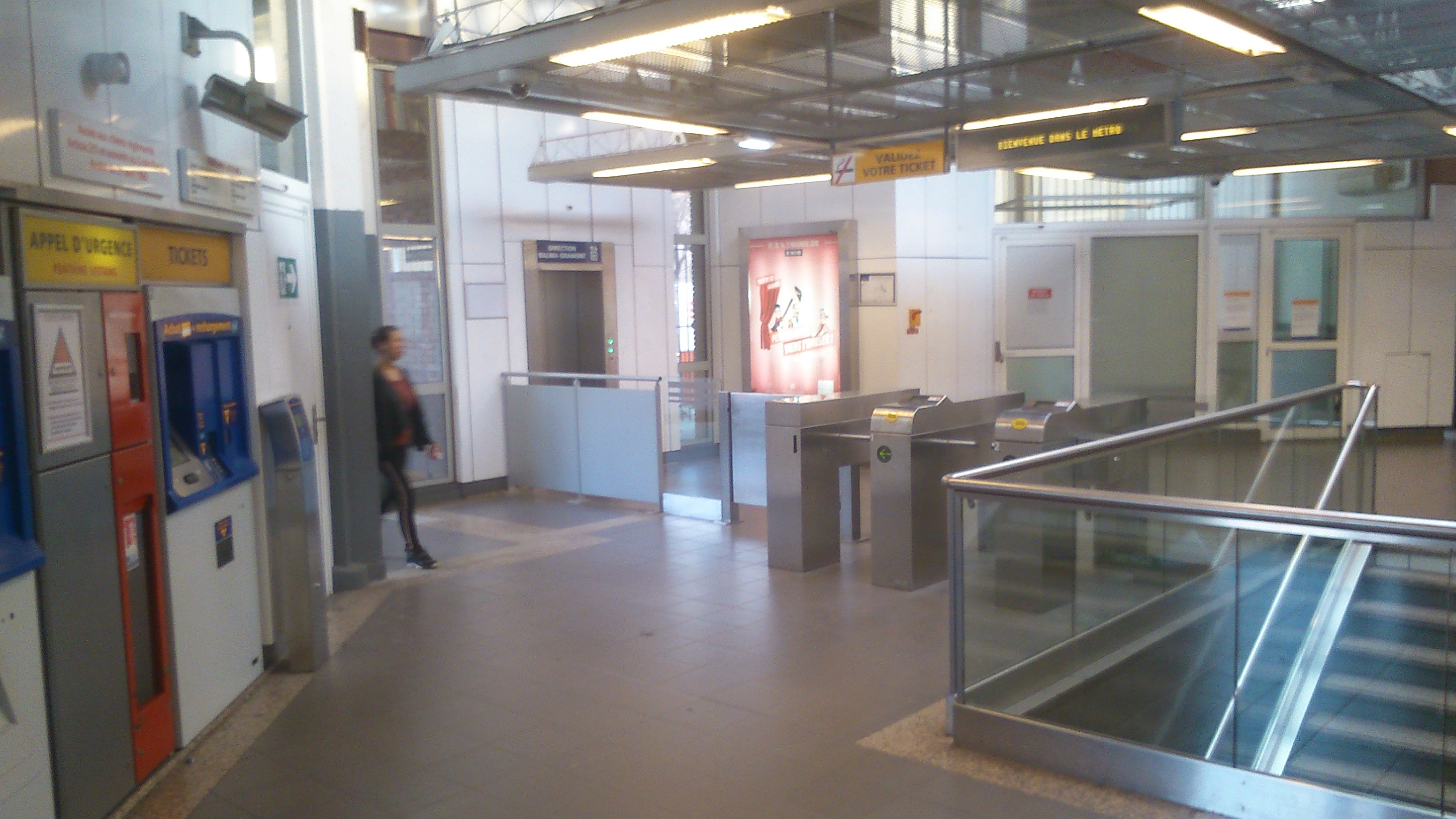 Entrée de la station de métro Fontaine-Lestang à Toulouse